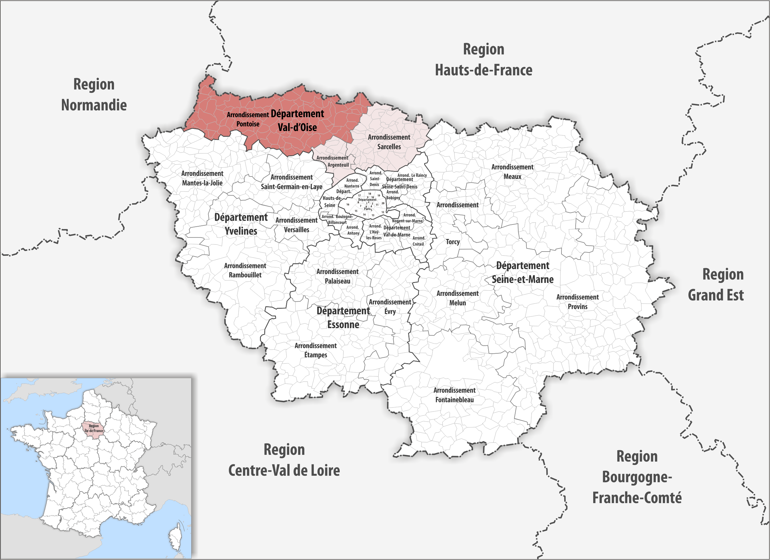 Lage des Arrondissements Pontoise